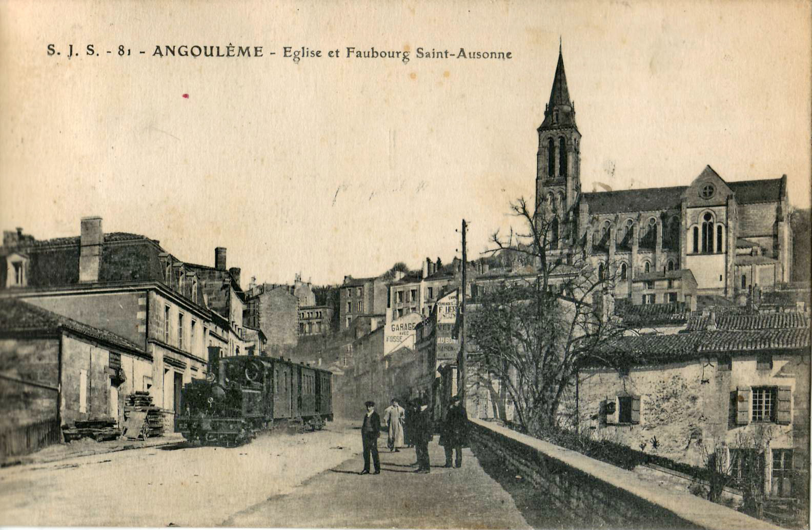 Carte postale ancienne éditée par S. J. S. n°81 : ANGOULÊME - Église et Faubourg Saint-Ausonne